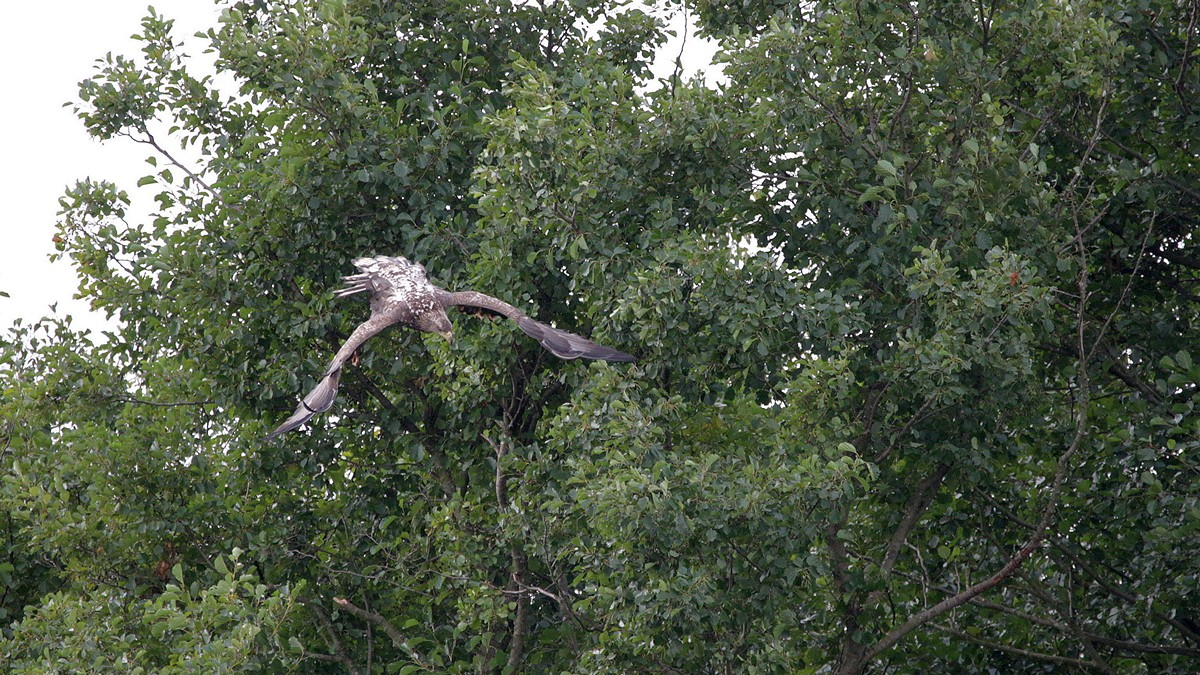 Seeadler im Sturzflug auf Beute, Mecklenburg